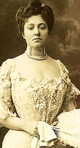 Alessandrina nei primi anni del '900